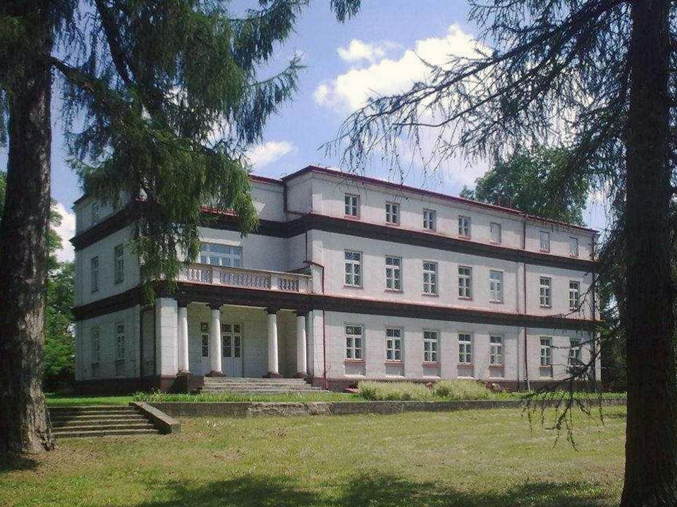 Dwór w Strzałkowie